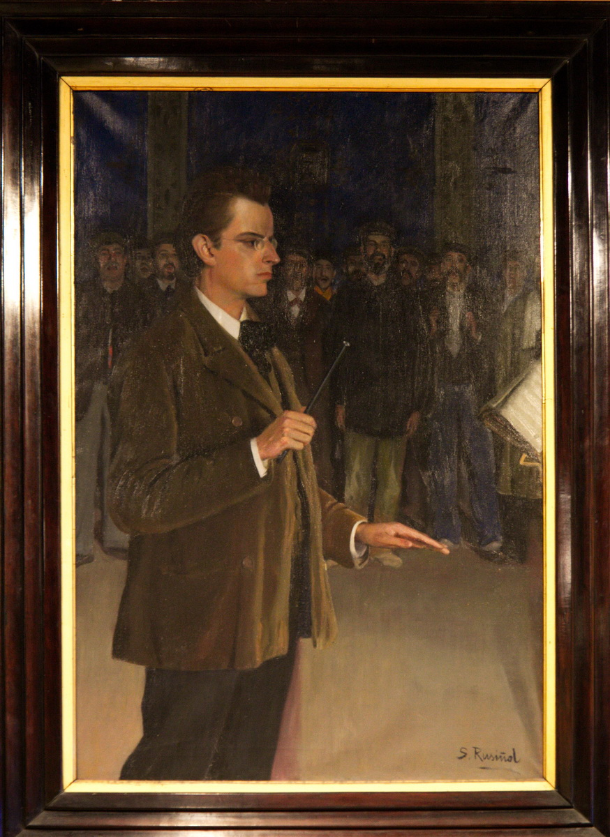 Retrat d'Enric Morera, obra de Santiago Rusiñol, al Museu Cau Ferrat.